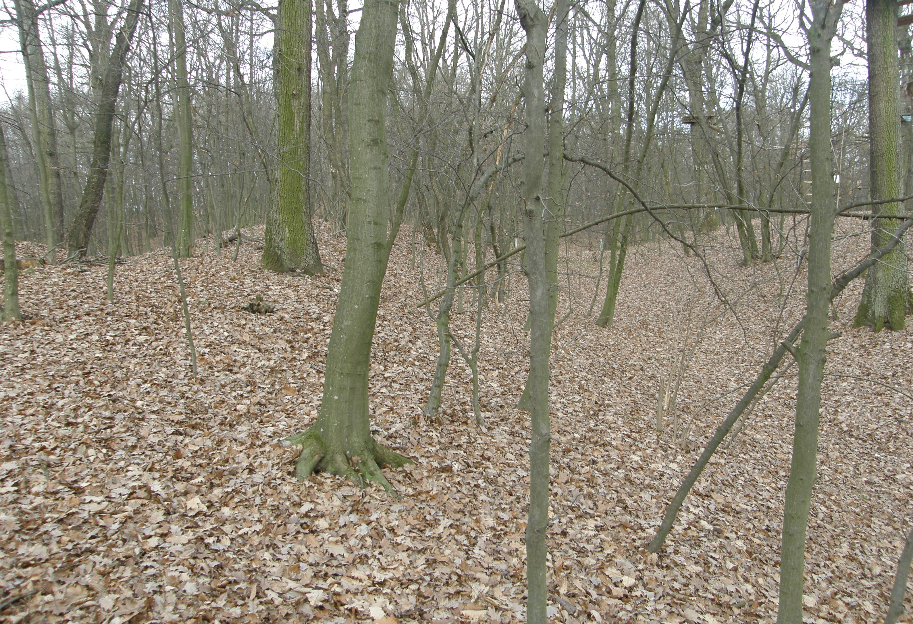 Befestigte Höhensiedlung Ochsenberg